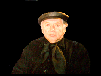 Portrait d'Julio Leparc.